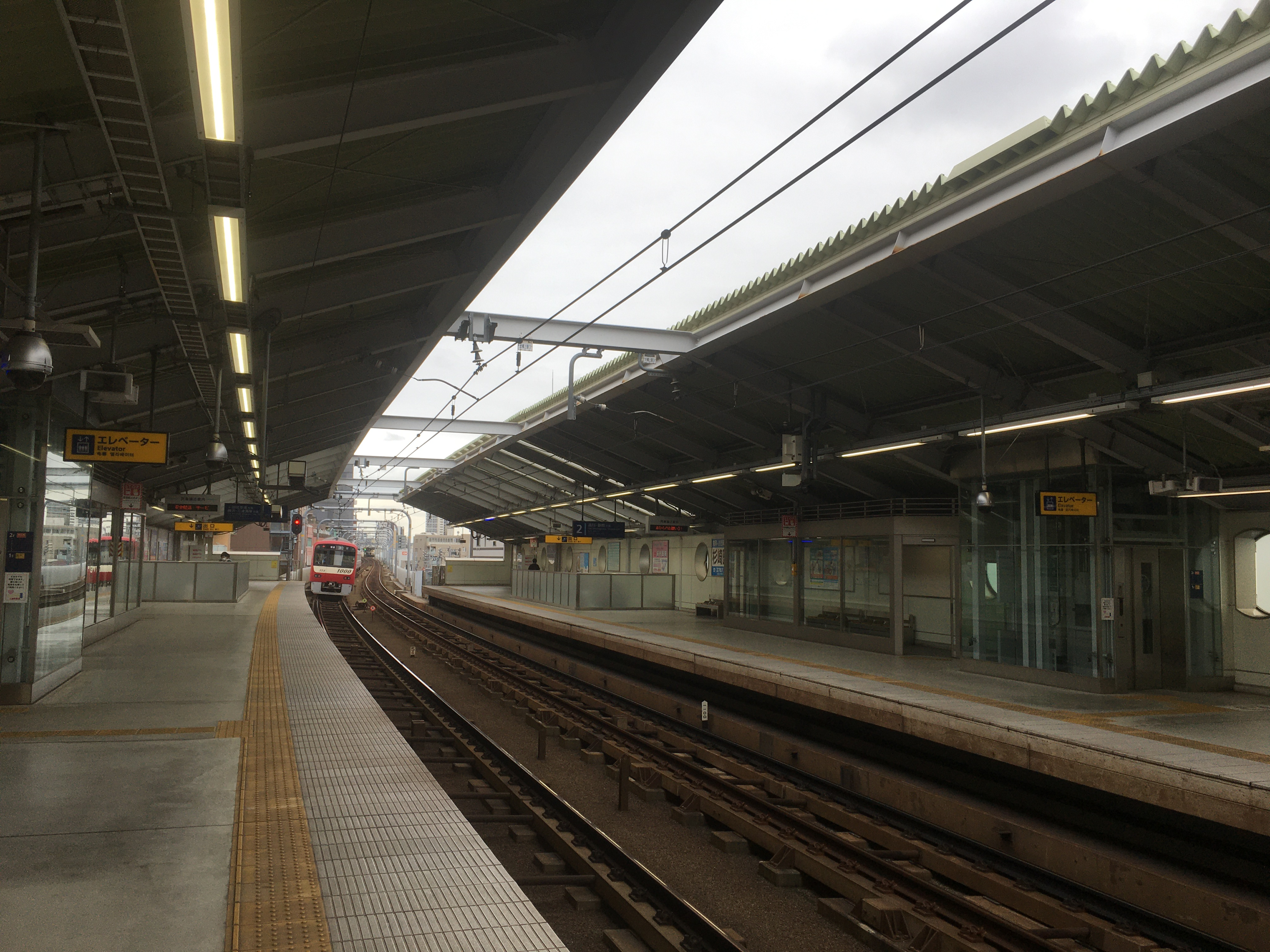 大森町駅 (Ōmorimachi Station)